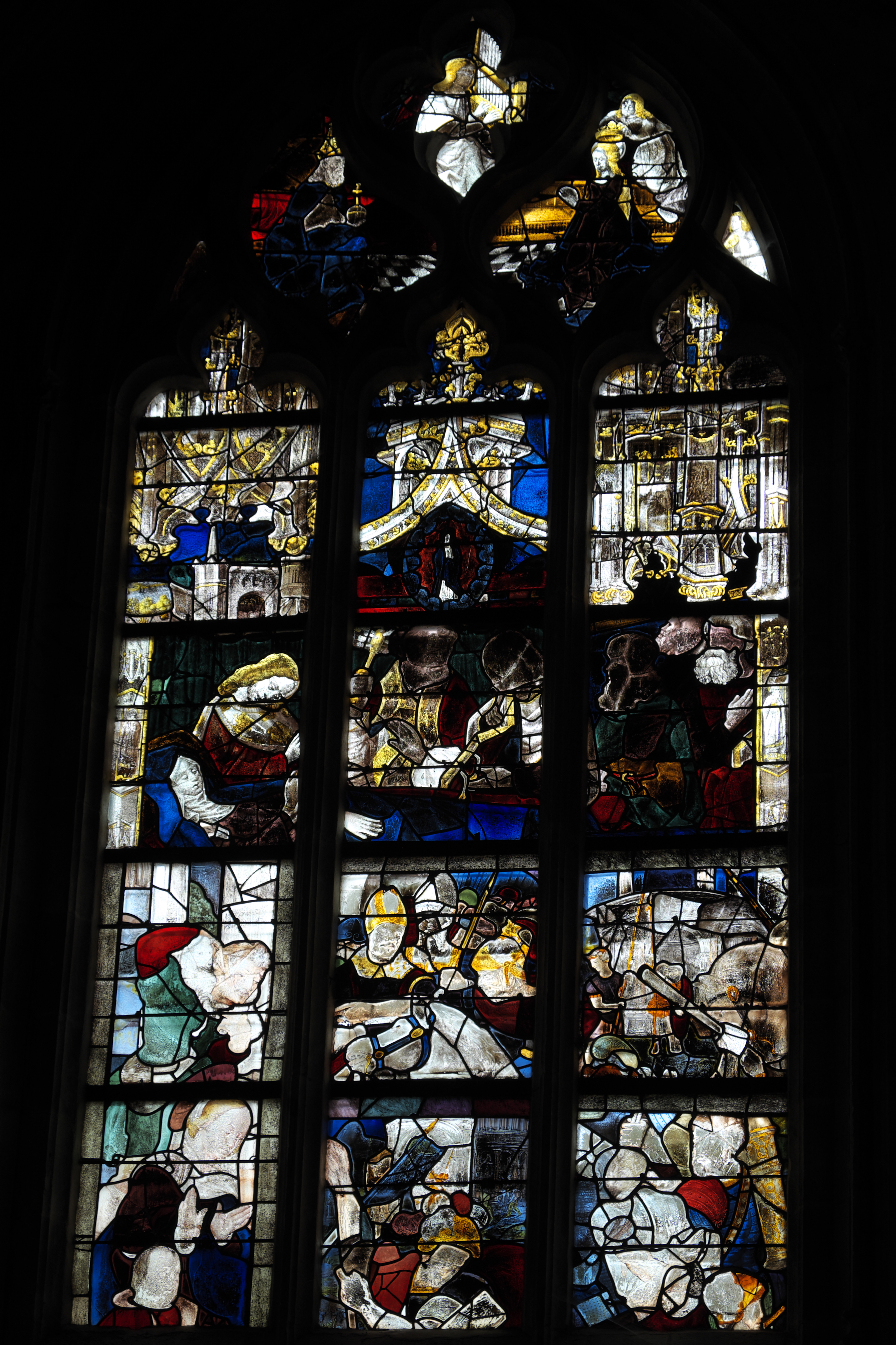 Katholische Pfarrkirche Notre-Dame-des-Marais in La Ferté-Bernard im Département Sarthe (Pays de la Loire/Frankreich), Bleiglasfenster mit Fragmenten aus dem späten 15. Jahrhundert und der ersten Hälfte des 16. Jahrhunderts, von Robert und Jean Courtois; Darstellung: Marientod, Geburt Christi u.a.